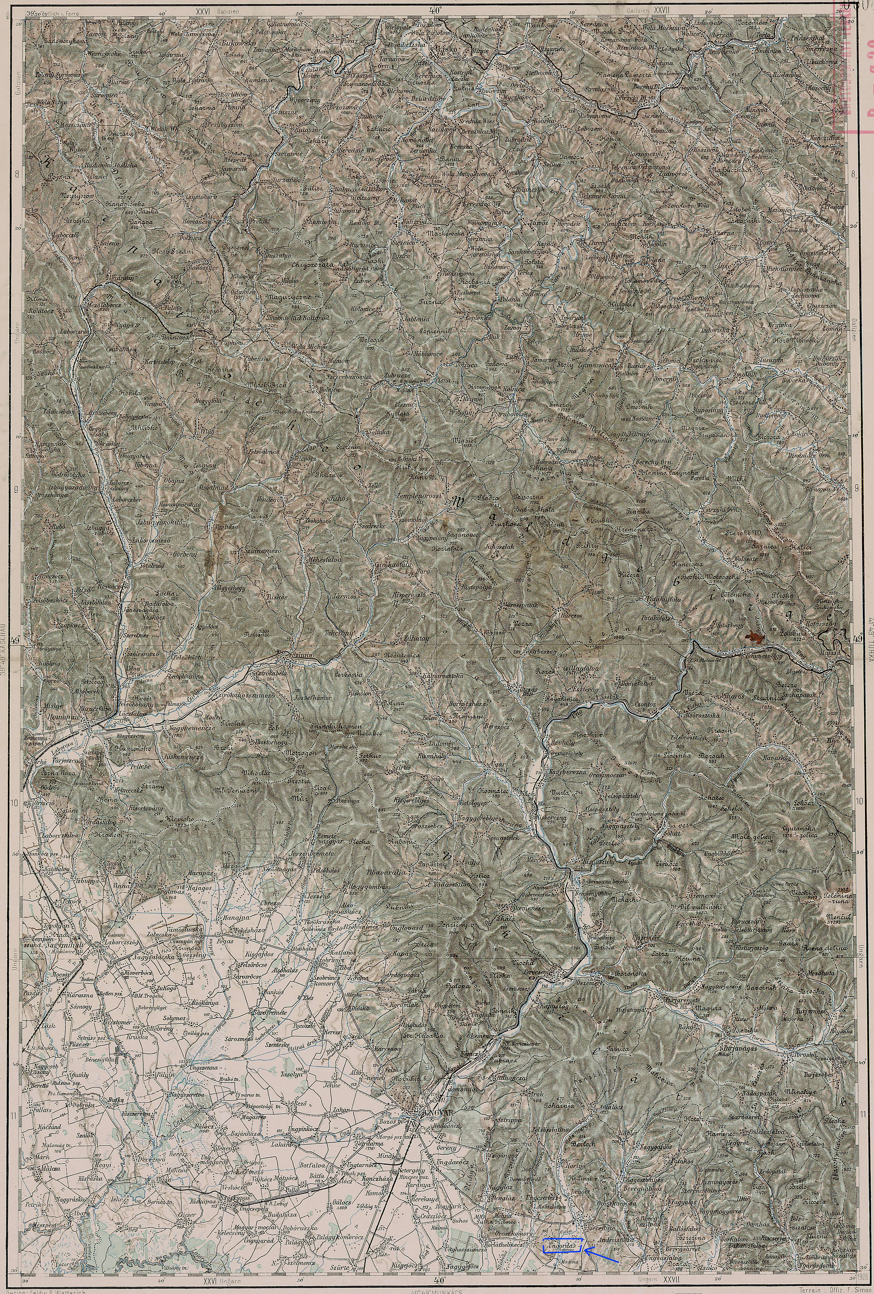 Австро-угорьска географічна карта 1910 р. Назва села Вовкове Унгордаш (Ungordas)